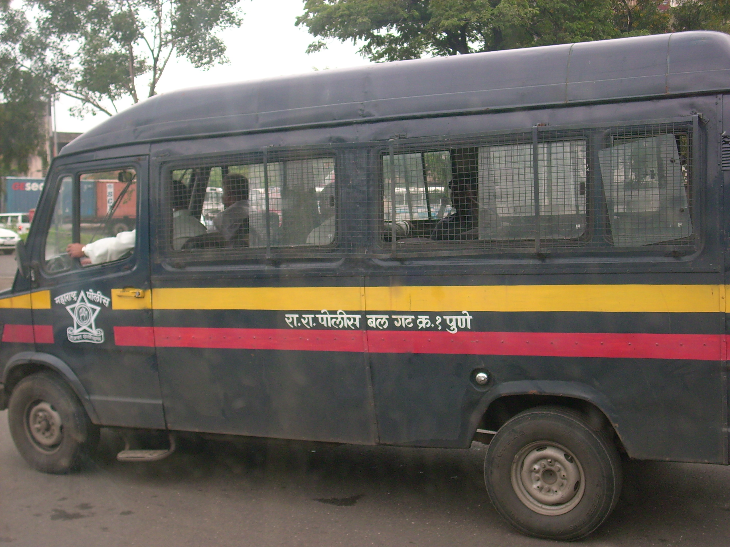 سيارات الشرطة في الهند.